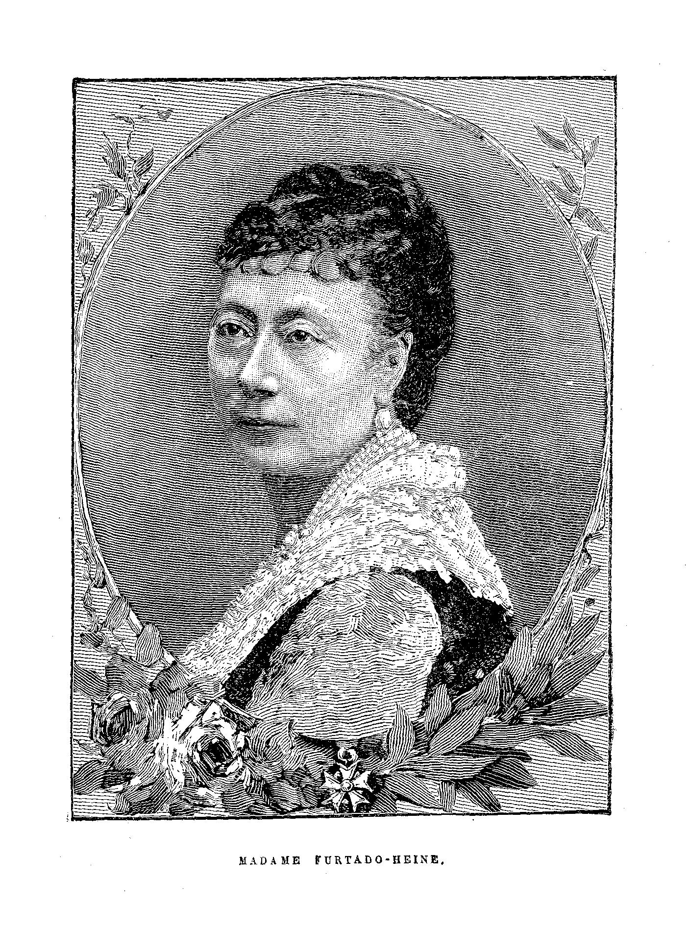 Cécile Furtado, épouse Heine